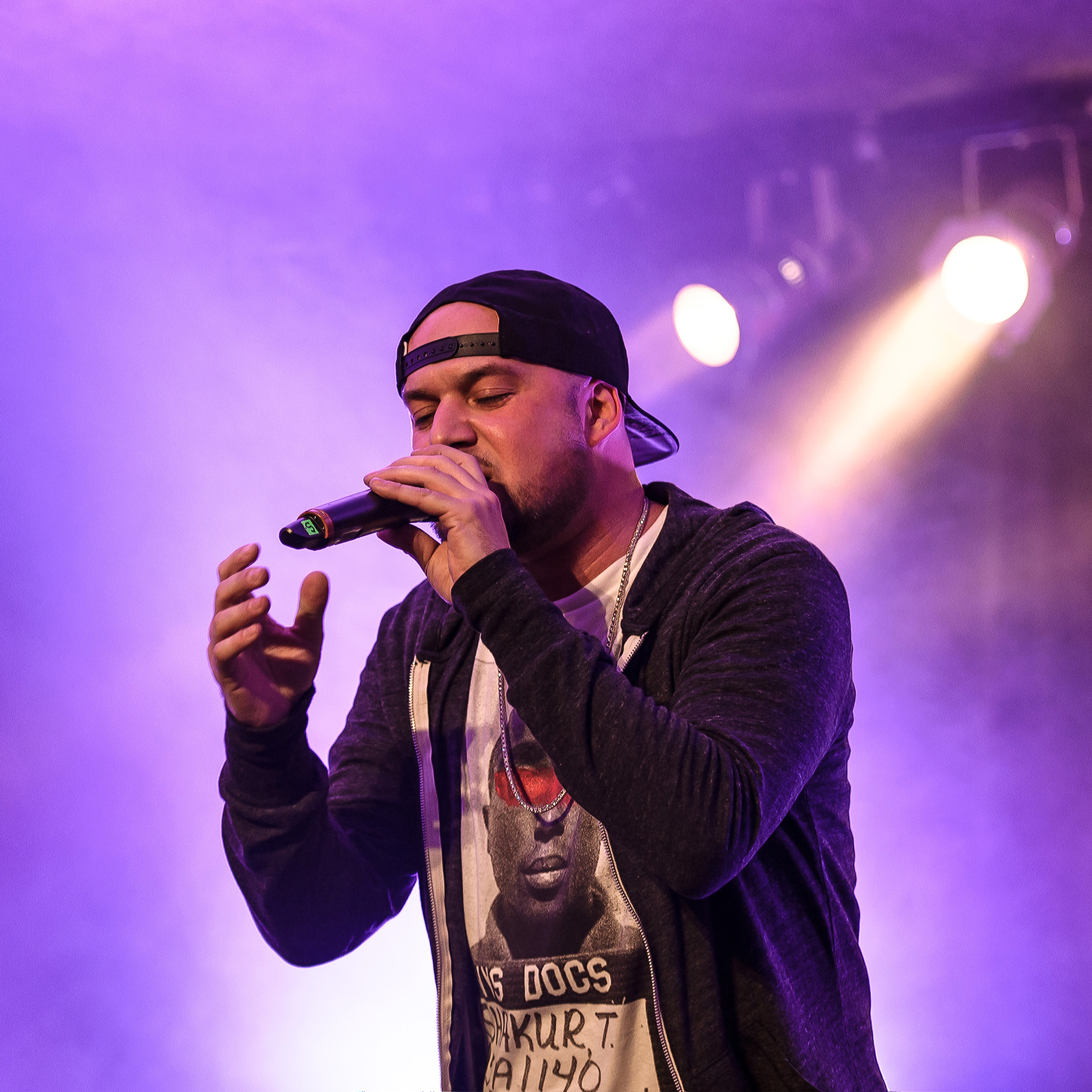 Kool Savas bei einem Konzert